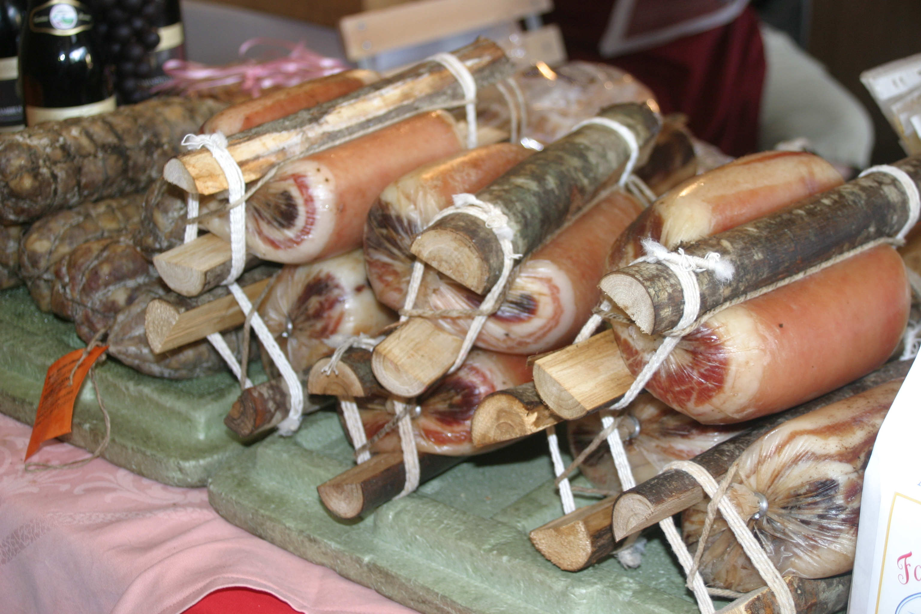 gruppo di pancette affumucate